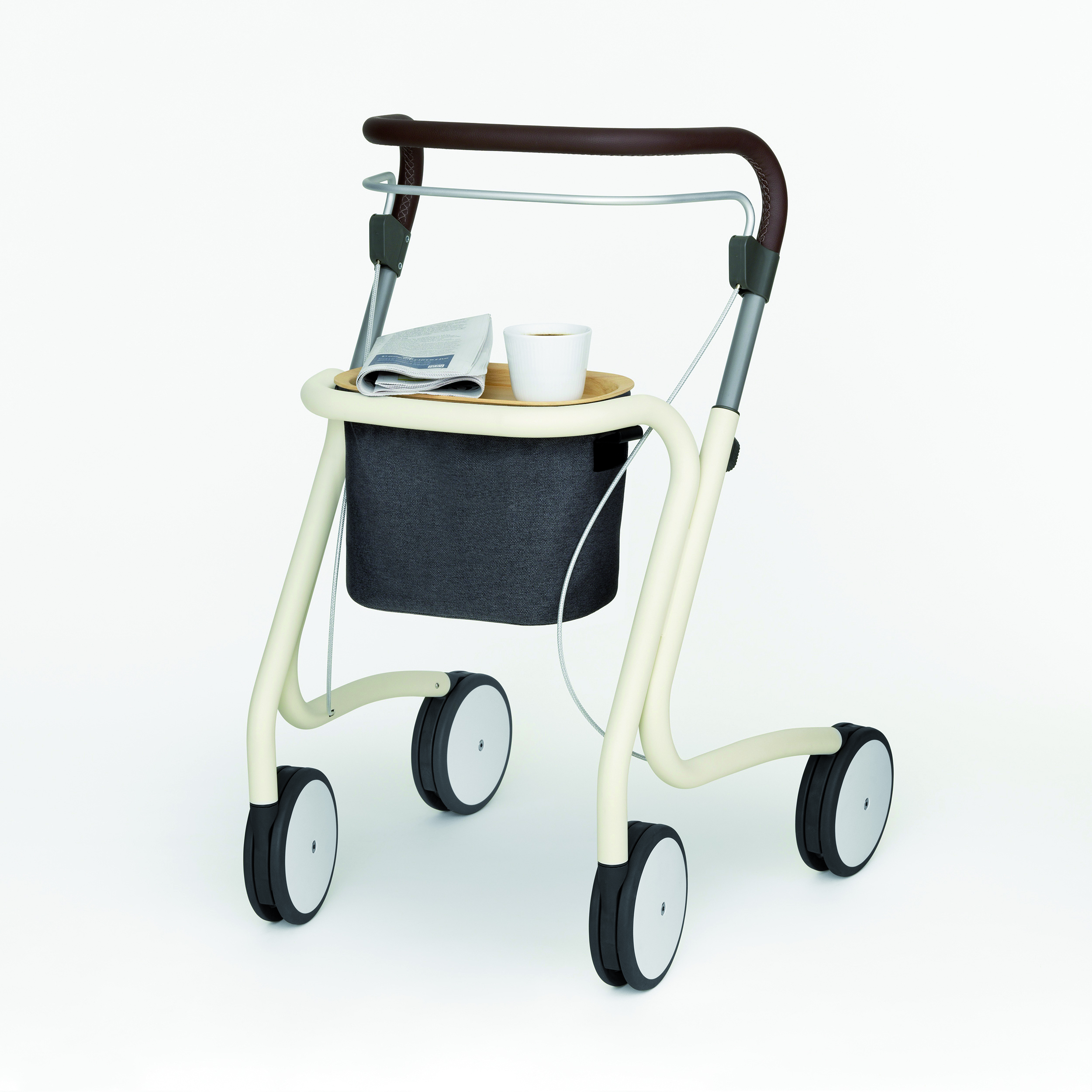 Een voorbeeld van een binnenrollator die ook geschikt is voor buitengebruik omdat het grote dubbele wielen heeft.